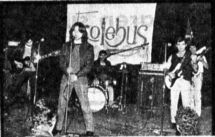 Grupo Trolebús en concierto (1987).